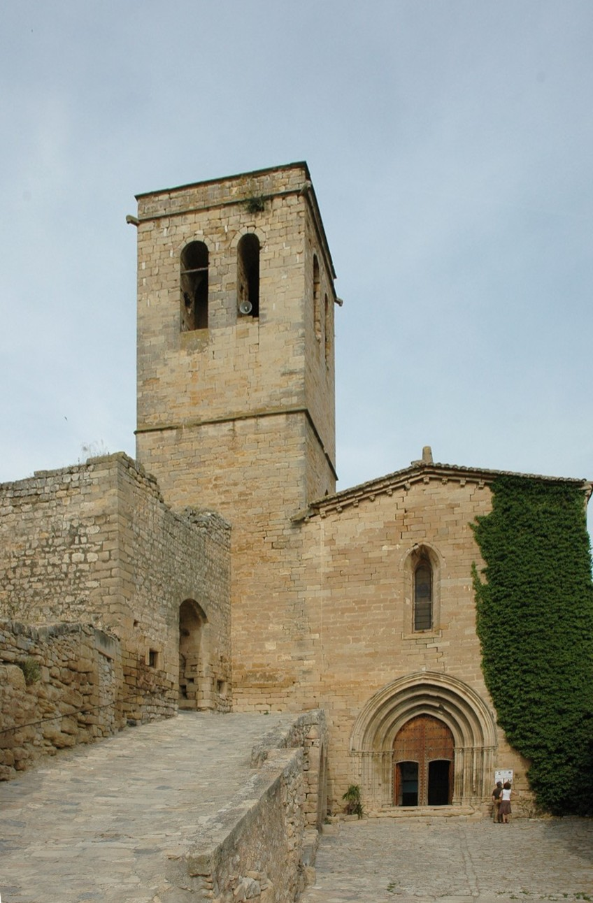 Santa Maria de Guimerà